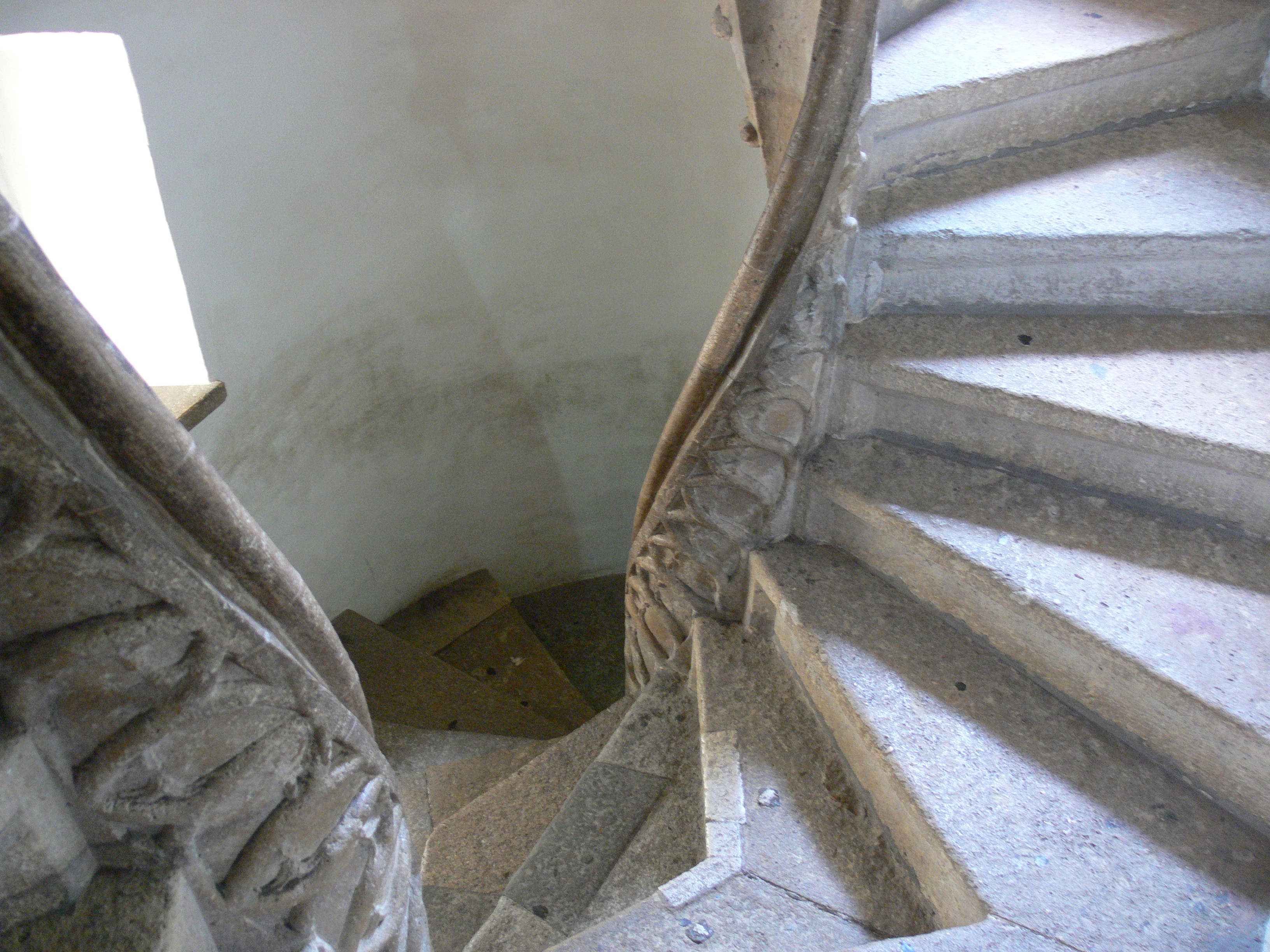 Graz, Grazer Burg Doppelwendeltreppe